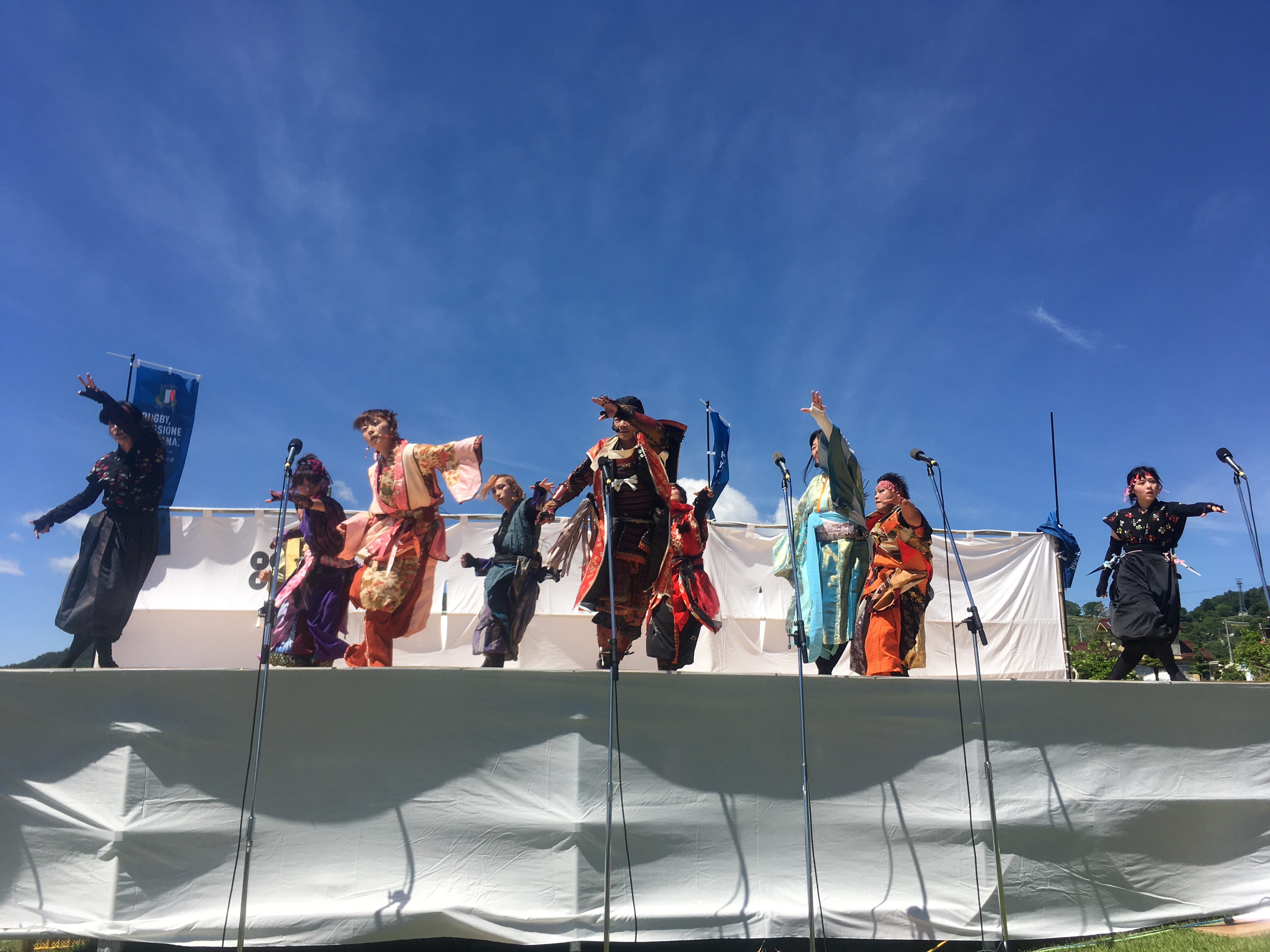 信州上田おもてなし武将隊 真田幸村と十勇士 ２０１８年５月２０日「御屋敷つつじ祭り」